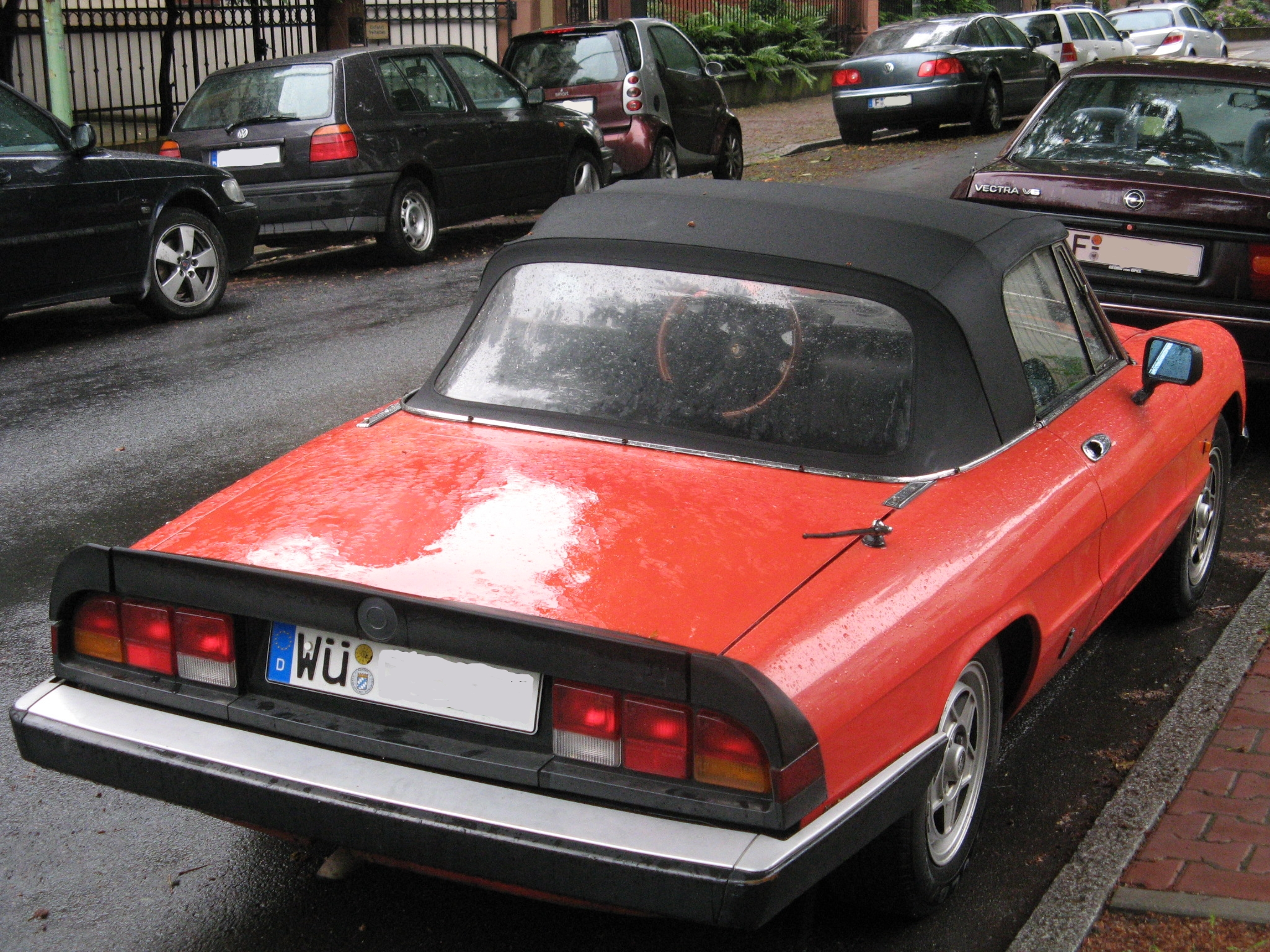 Alfa Romeo Spider 3rd generation in Frankfurt, Germany